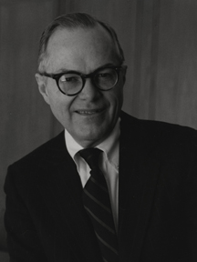 Manny Carter